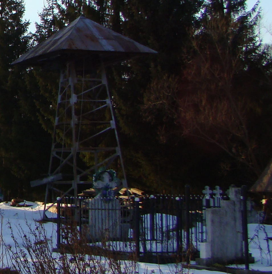 Biserica de lemn „Înălțarea Domnului” din Arieșeni, județul Alba